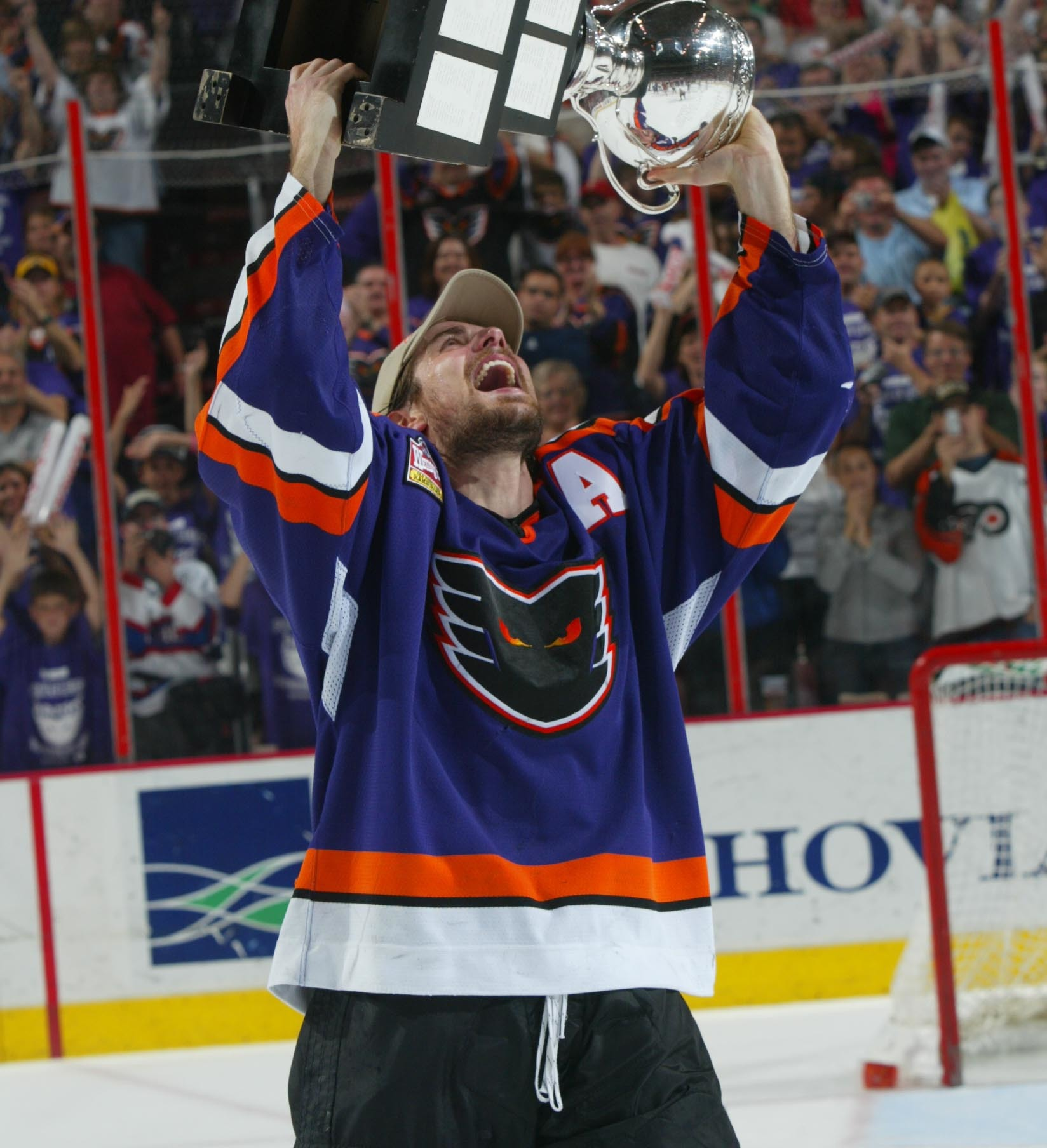 Photo: Bruce Bennett/AHL